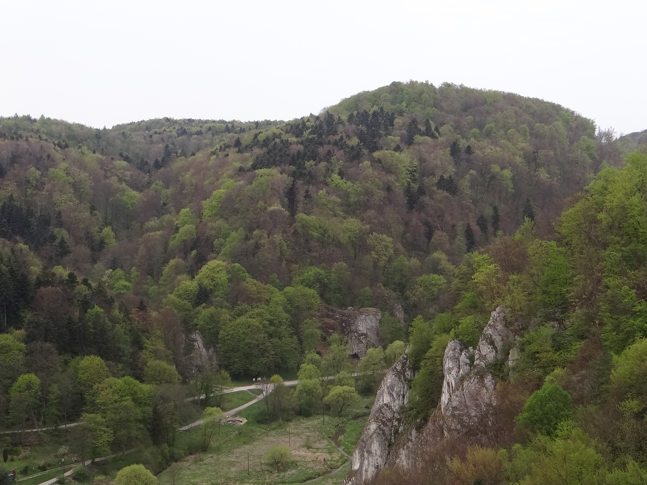 Chełmowa Góra i Dolina Za Bramą Krakowską w Ojcowskim Parku Narodowym. Widok z Góry Koronnej